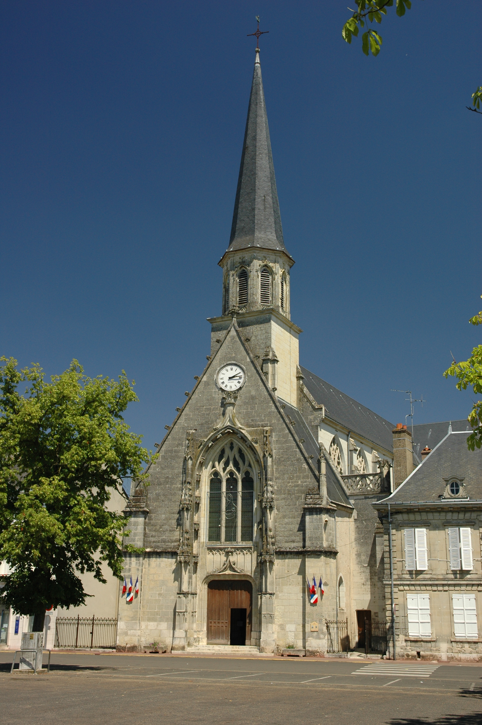 France Loir-et-Cher Montoire-sur-le-Loir Photographie prise par GIRAUD Patrick